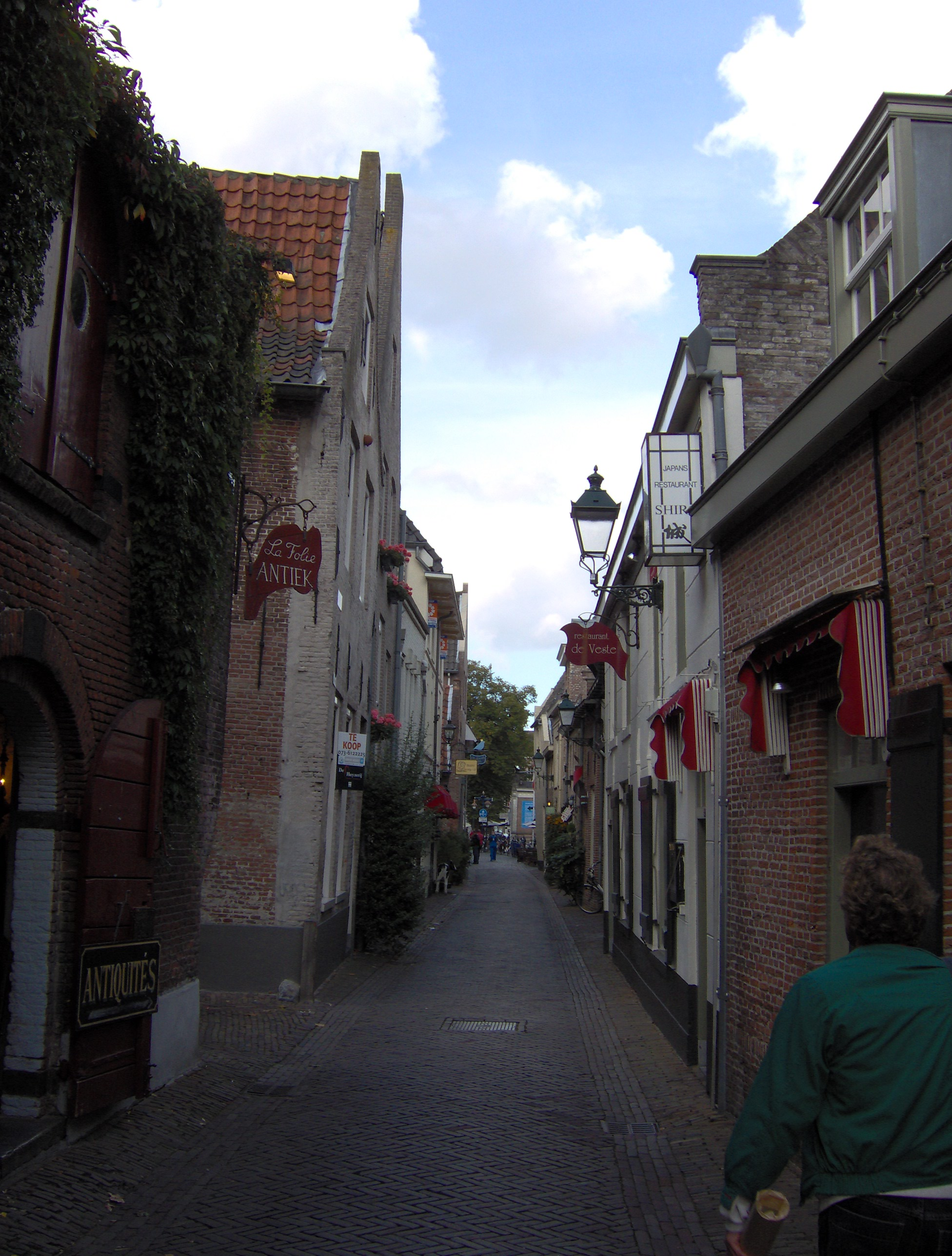 Uilenburg, den bosch.